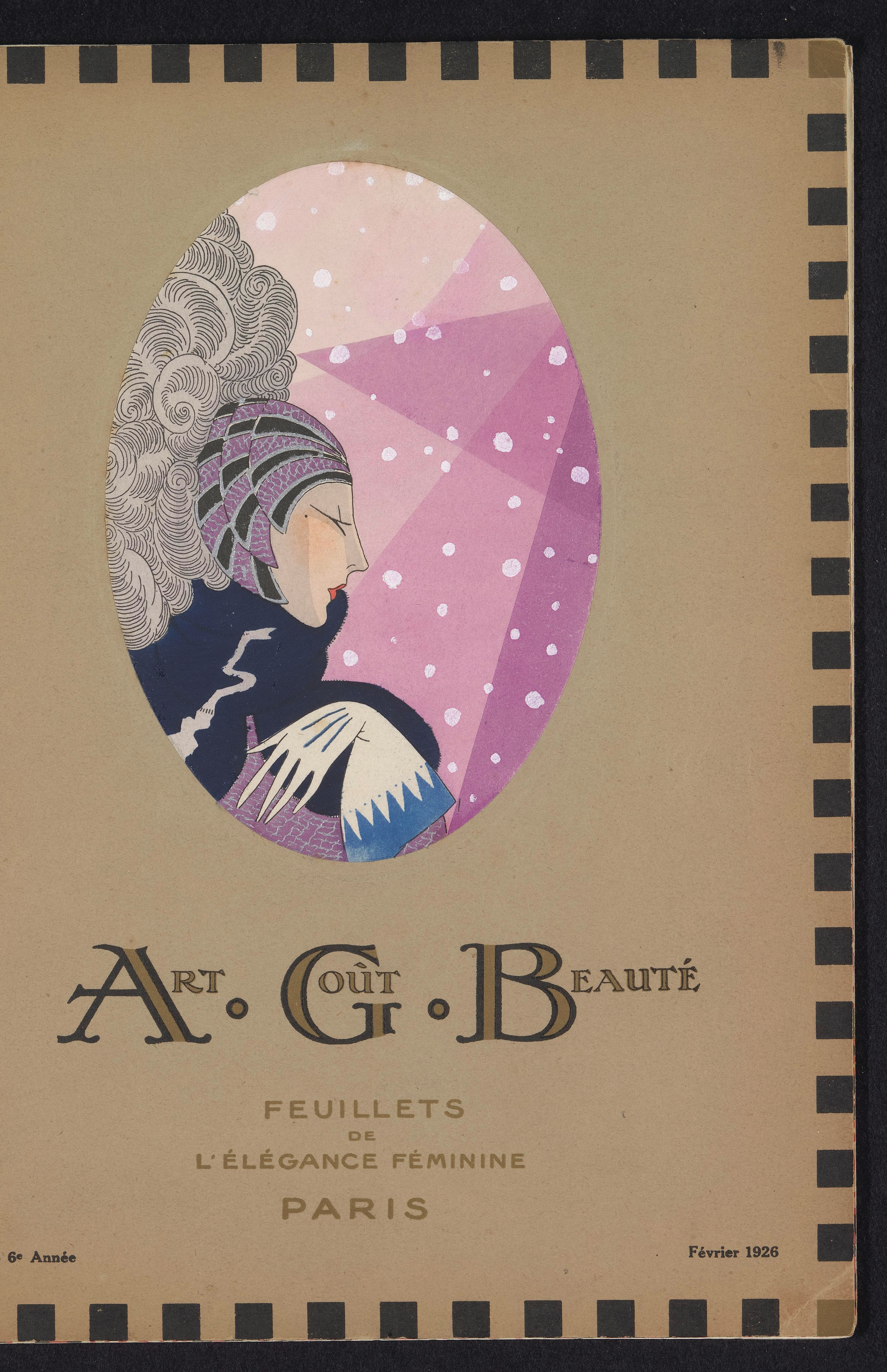 IdentificatieTitel(s): Schutbladen van Art. Goût. Beauté.Art - Goût - Beauté, Feuillets de l' élégance féminine, Février 1926, No. 66, 6e Année (titel op object)Objecttype: tijdschrift Objectnummer: RP-P-2009-4182Opschriften / Merken: titel, midden onder, gedrukt: ‘ART. GOÛT. BEAUTÉ’titel, midden onder, gedrukt: ‘FEUILLETS DE L'ÉlÉGANCE FÉMININE / PARIS’Omschrijving: Omslag van het modetijdschrift Art-Goût-Beauté (1920-1933), februari 1926, No. 66. Afbeelding van een vrouw, en profil, met donkerblauwe sjaal. Witte handschoen met lichtblauw zig-zag motief bij de zoom.VervaardigingVervaardiger: prentmaker: anoniemuitgever: Charles Goy (vermeld op object)Datering: 1926Fysieke kenmerken: lithografie, met sjablonen en de hand gekleurd, penseel in zilverMateriaal: papier Techniek: lithografie (techniek) / pochoir / met de hand kleuren / penseelAfmetingen: blad: h 315 mm × b 240 mmOnderwerpWat: fashion platesgloves, mittens (SHORT GLOVES) (+ women's clothes)clothing for the upper part of the body (SHAWL) (+ women's clothes)head-gear (+ women's clothes)Wanneer: 1926 - 1926Verwerving en rechtenCredit line: Bruikleen van de Collectie M.A. Ghering-van IerlantVerwerving: bruikleen 4-dec-2014Copyright: Publiek domein